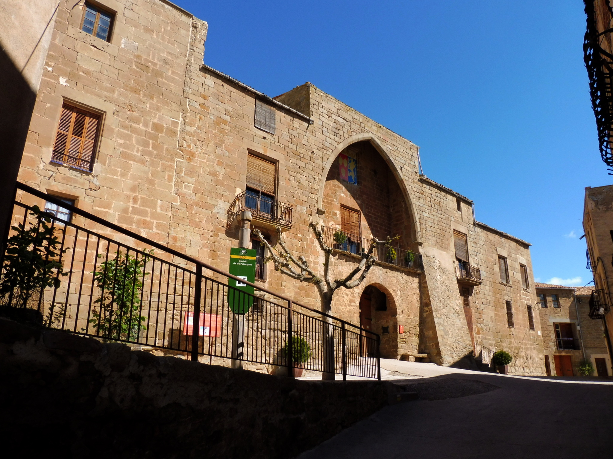 Castell de les Pallargues (els Plans de Sió)